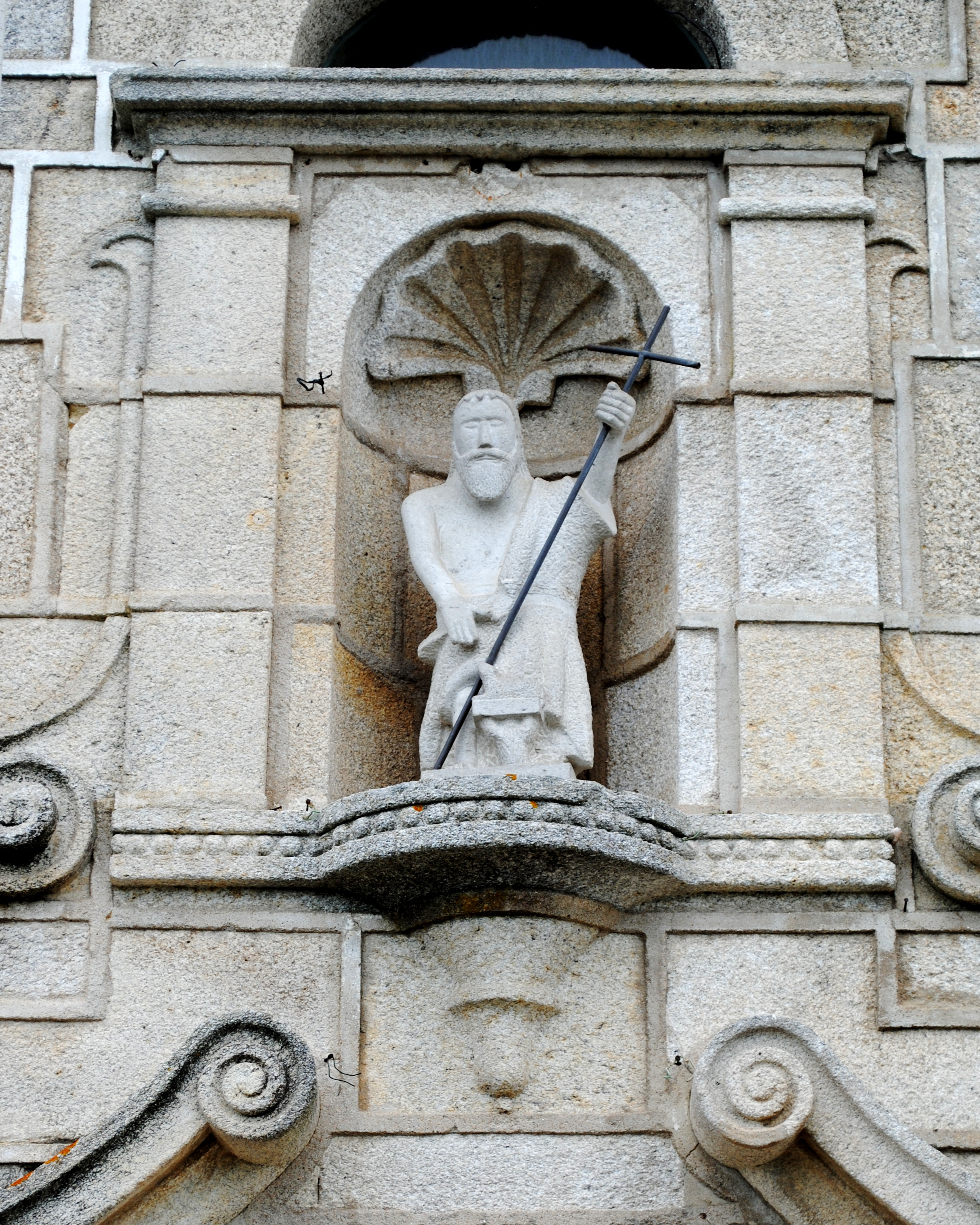 O Porriño, S. Xoán Bautista de Chenlo.